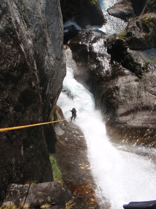 Calata iniziale della seconda parte